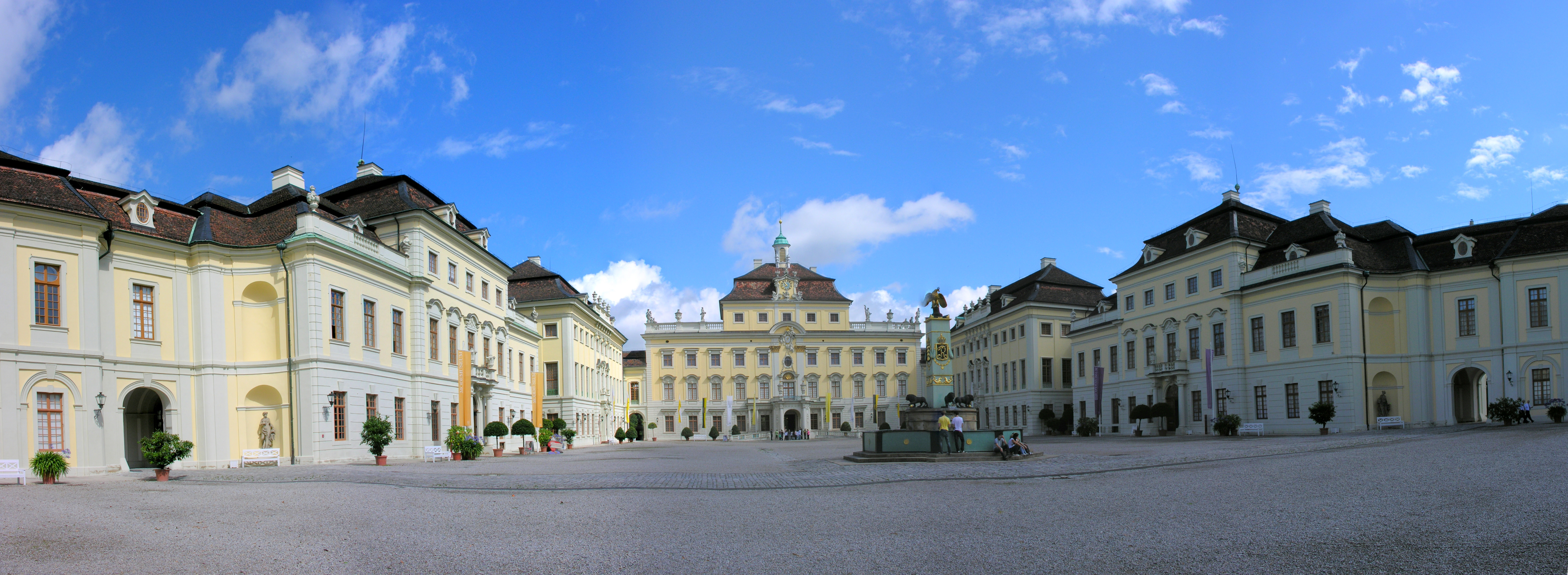 Germany, Baden-Württemberg, Schloss Ludwigsburg